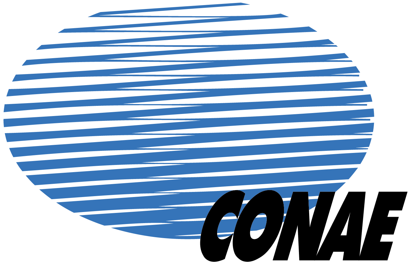 Logo de la CONAE.